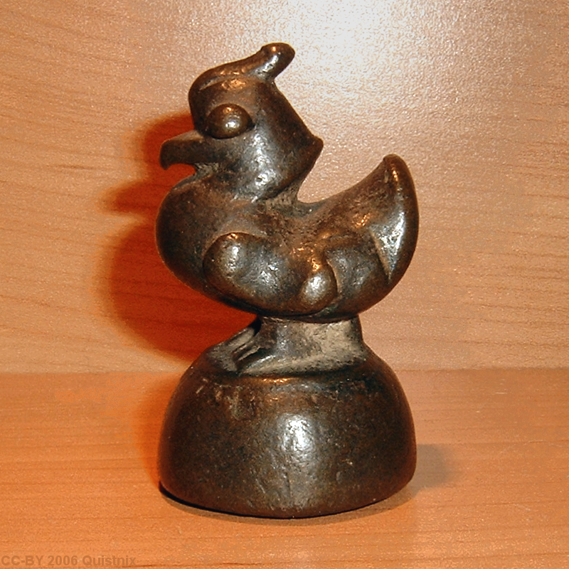 Opiumgewicht (opium weight), type eend.